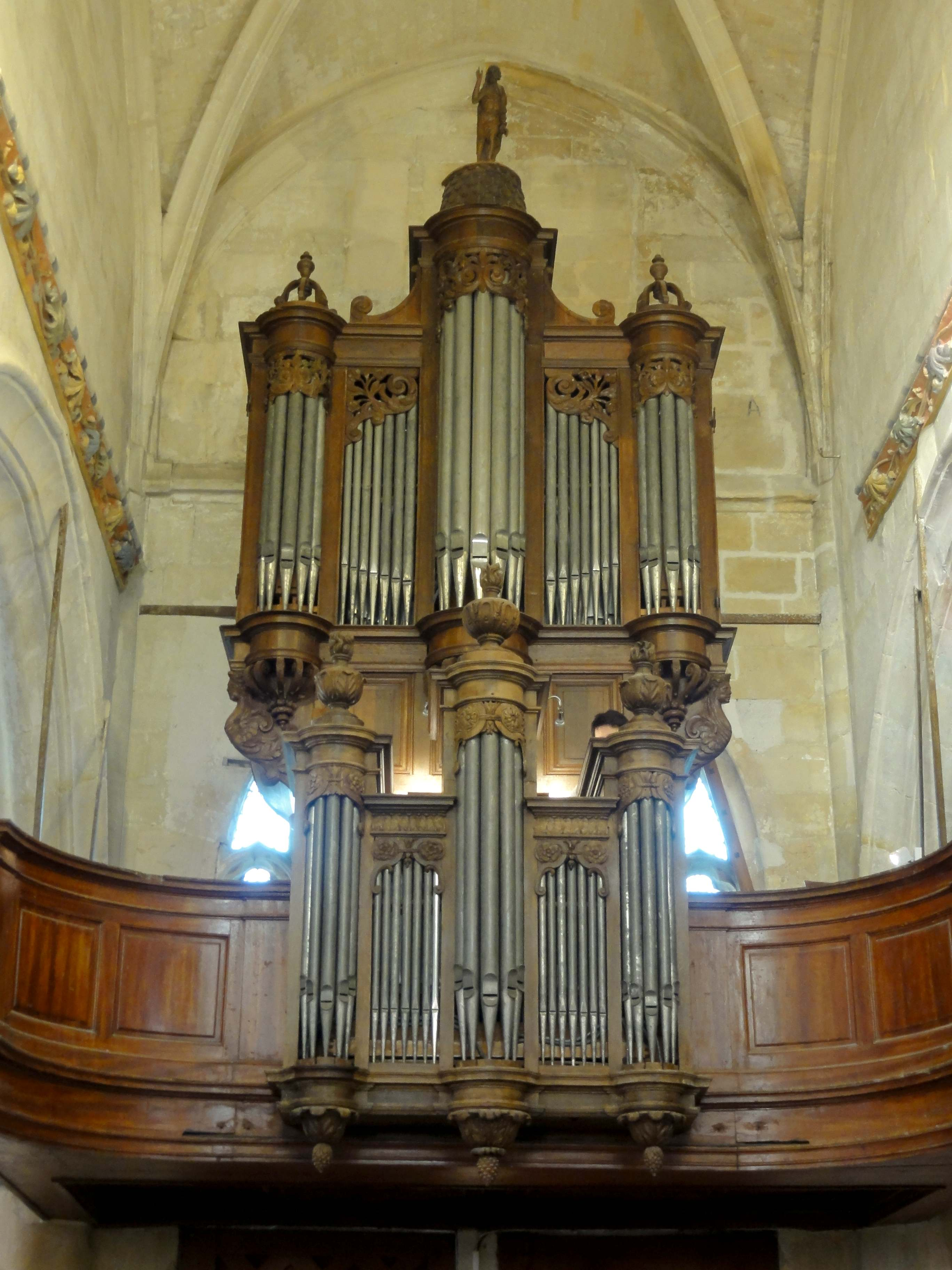 Mobilier de l'église - buffet classé M.H. de 1637 (grand corps) & 1675 (positif dorsal d'Hippolyte Ducastel), partie instrumentale refaite par Jean-Louis Boisseau & Bertrand Cattiaux en 1989.